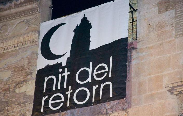 Cartel de la nit del retorn en la fachada de la Basílica de San Jaime de Algemesí.